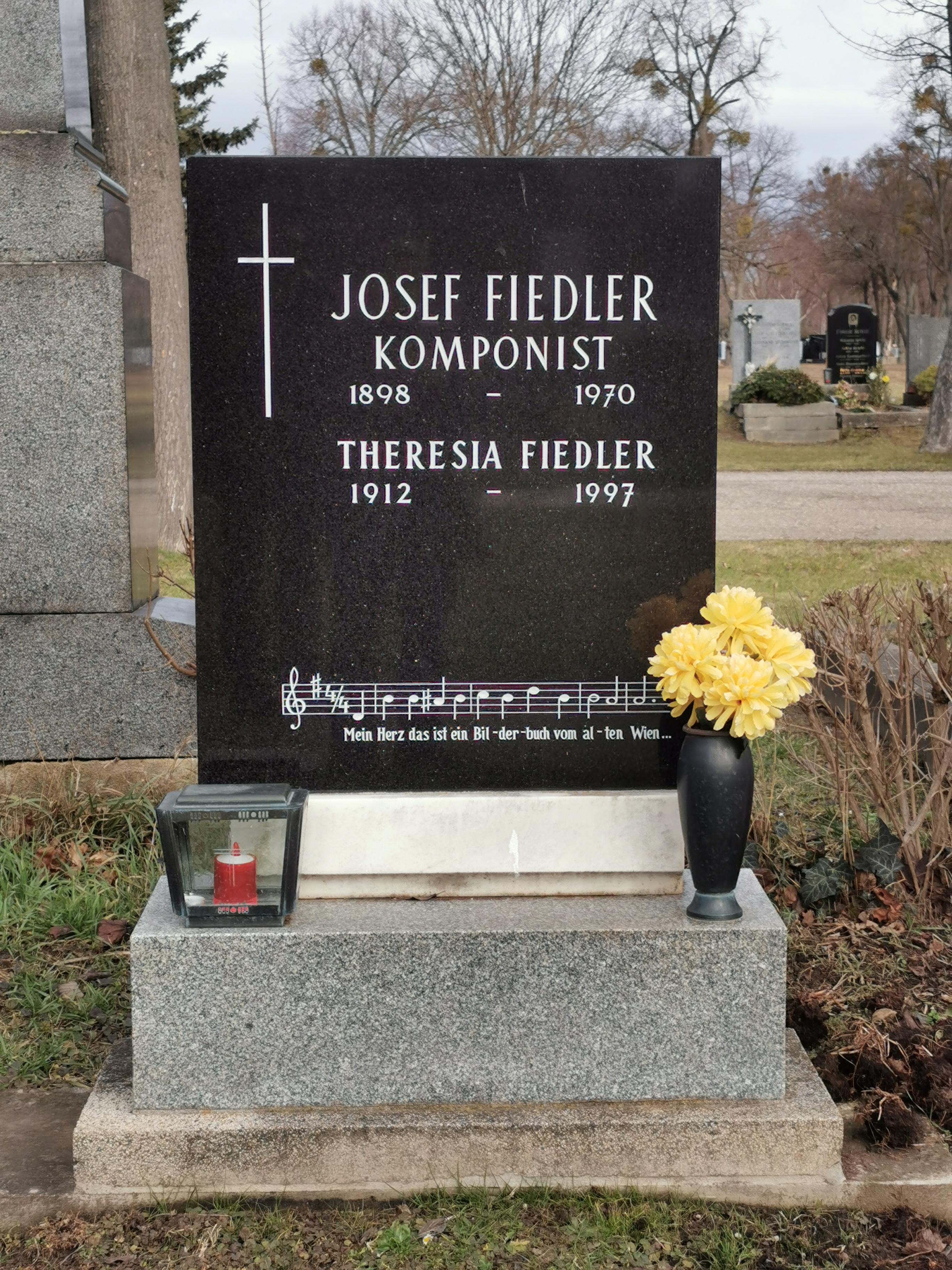 Grab von Josef Fiedler auf dem Wiener Zentralfriedhof